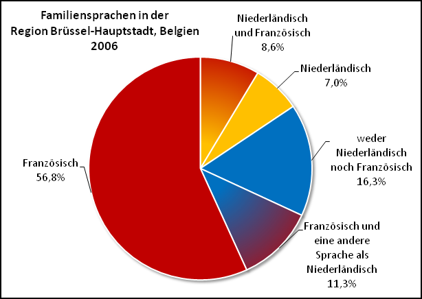 Familiensprachen in der Region Brüssel-Hauptstadt, Belgien 2006